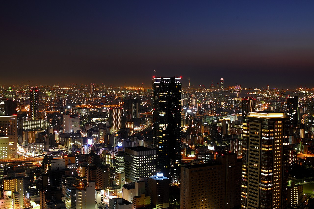 Osaka night view / 大阪しっぽりナイト_m-8